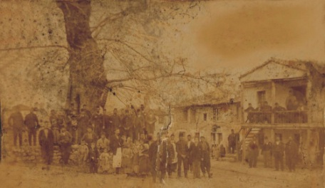 Старият платан в Касандрия